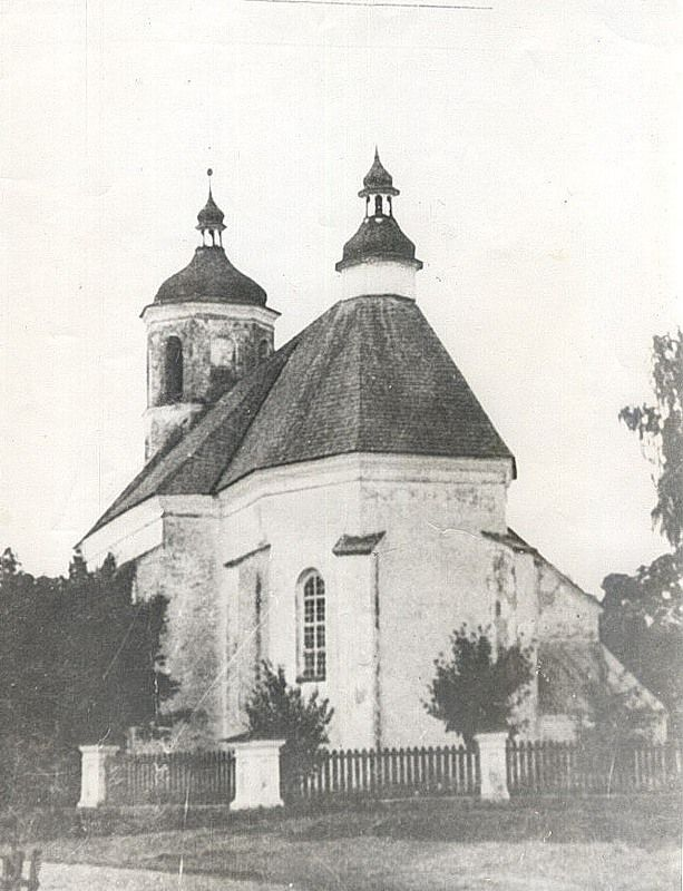 Беларуская (тарашкевіца): Клецак (Klecak), Фарны касьцёл (Fara)